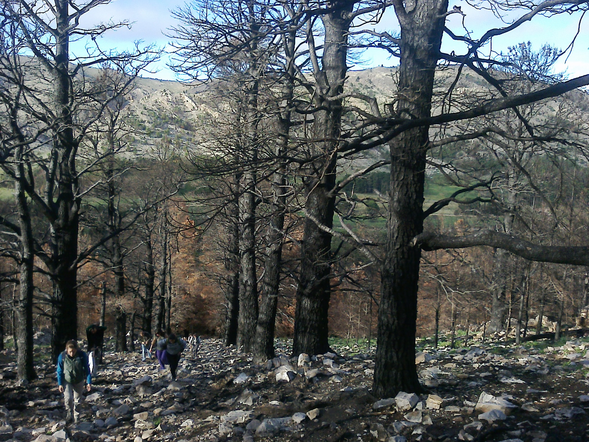 Plantaciones de arboles para fijar laderas